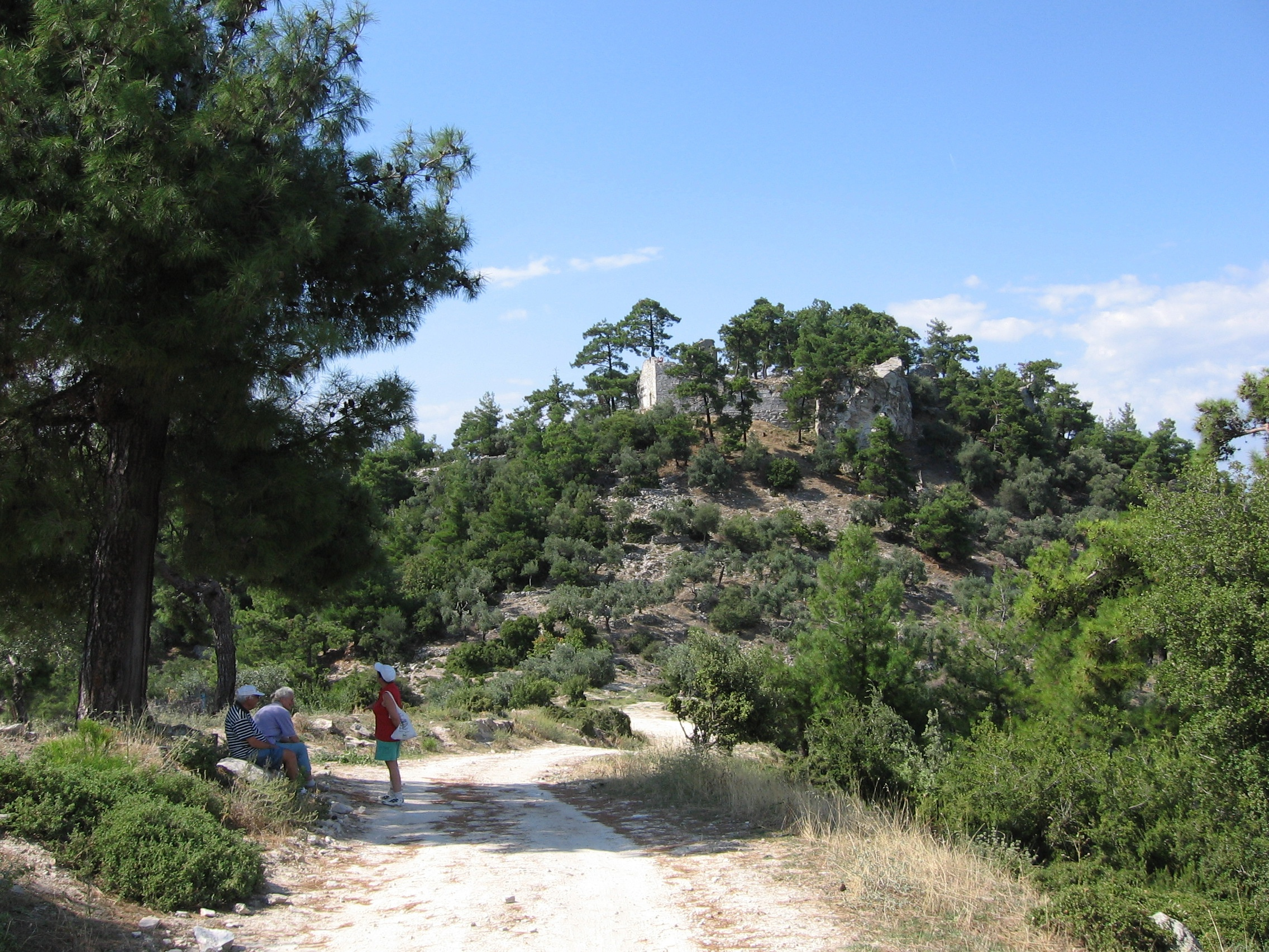 Venezianische Festung Limenas (2005)